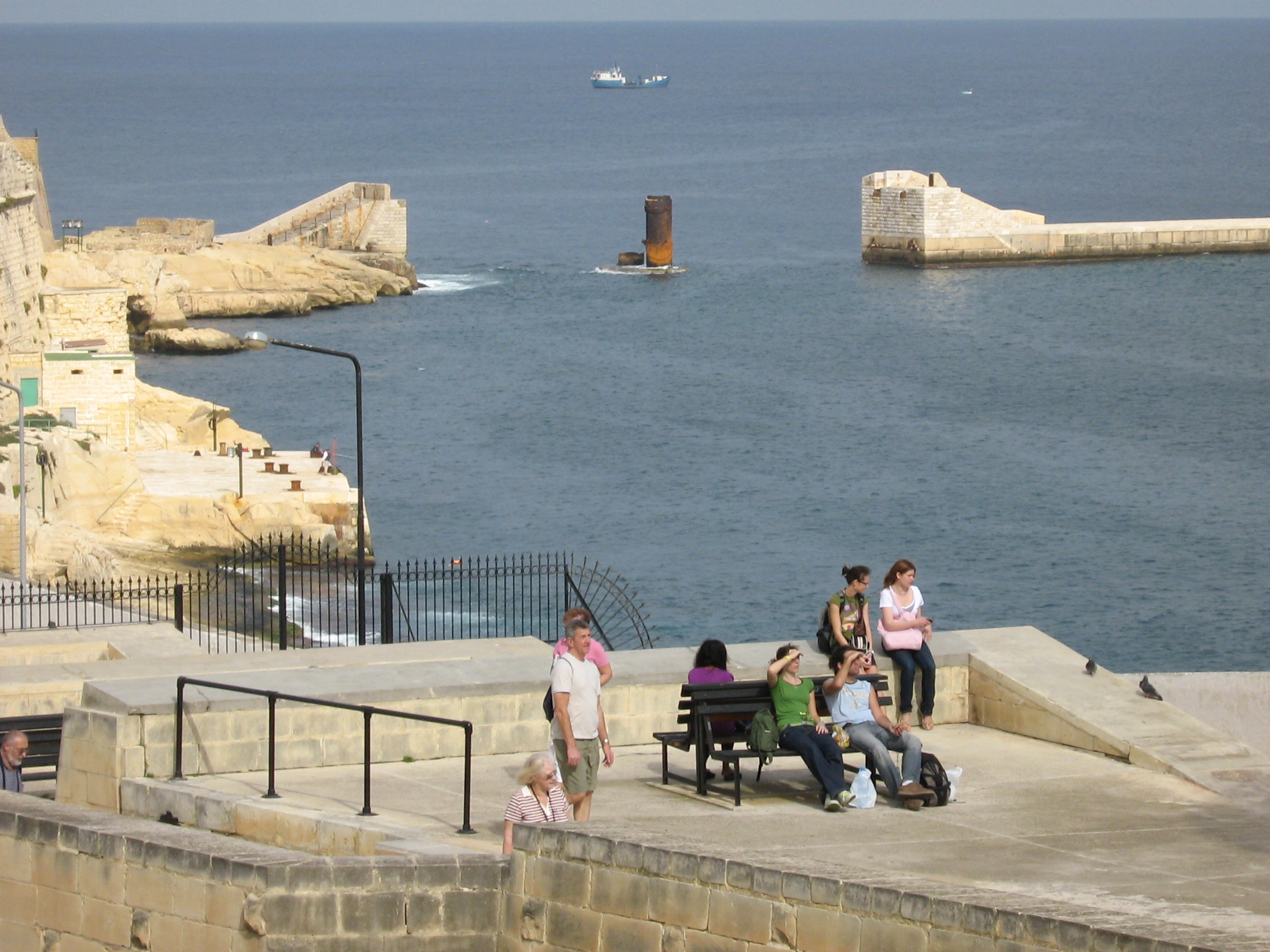 Валетта.